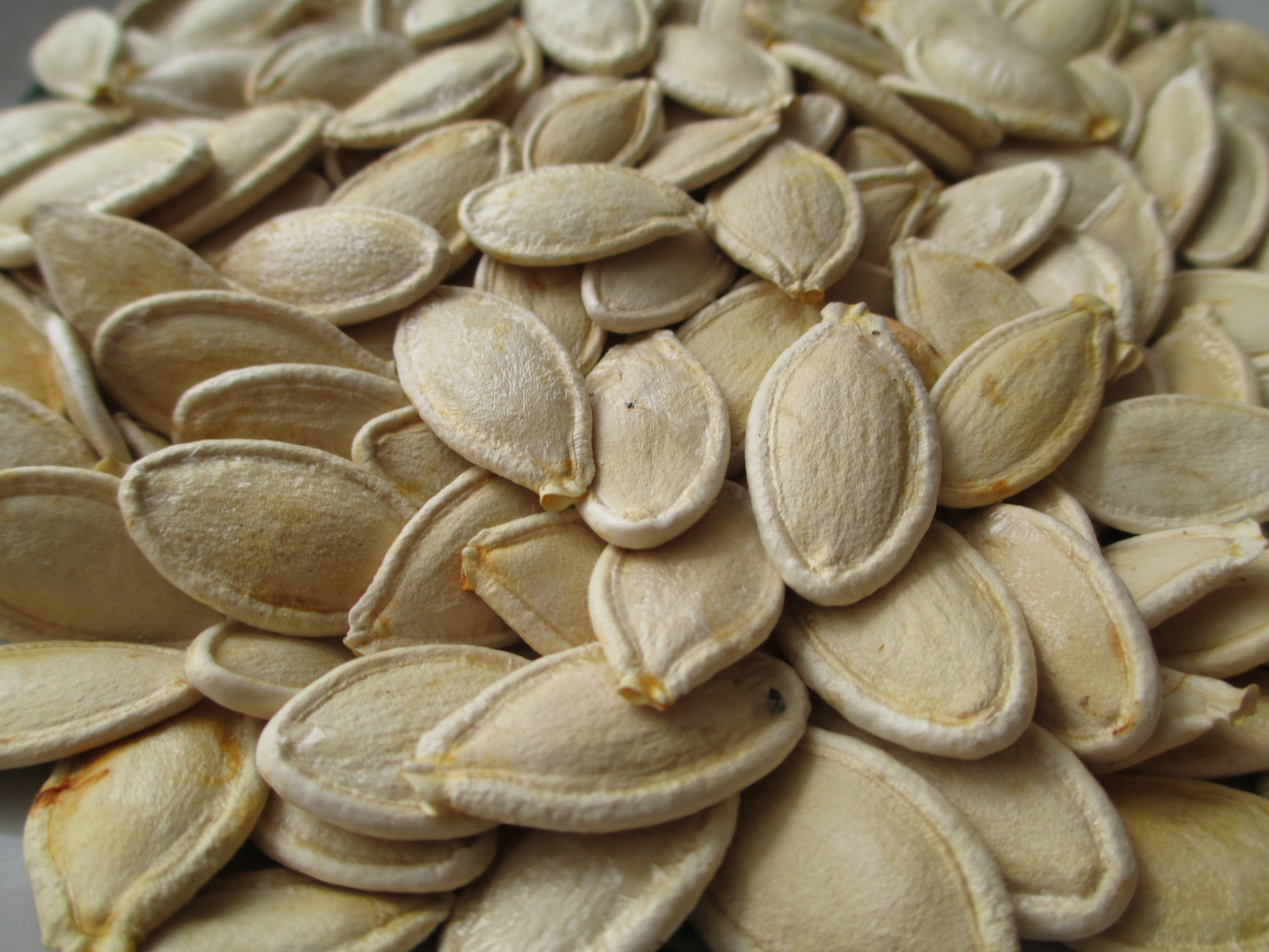 Сушене насіння дині